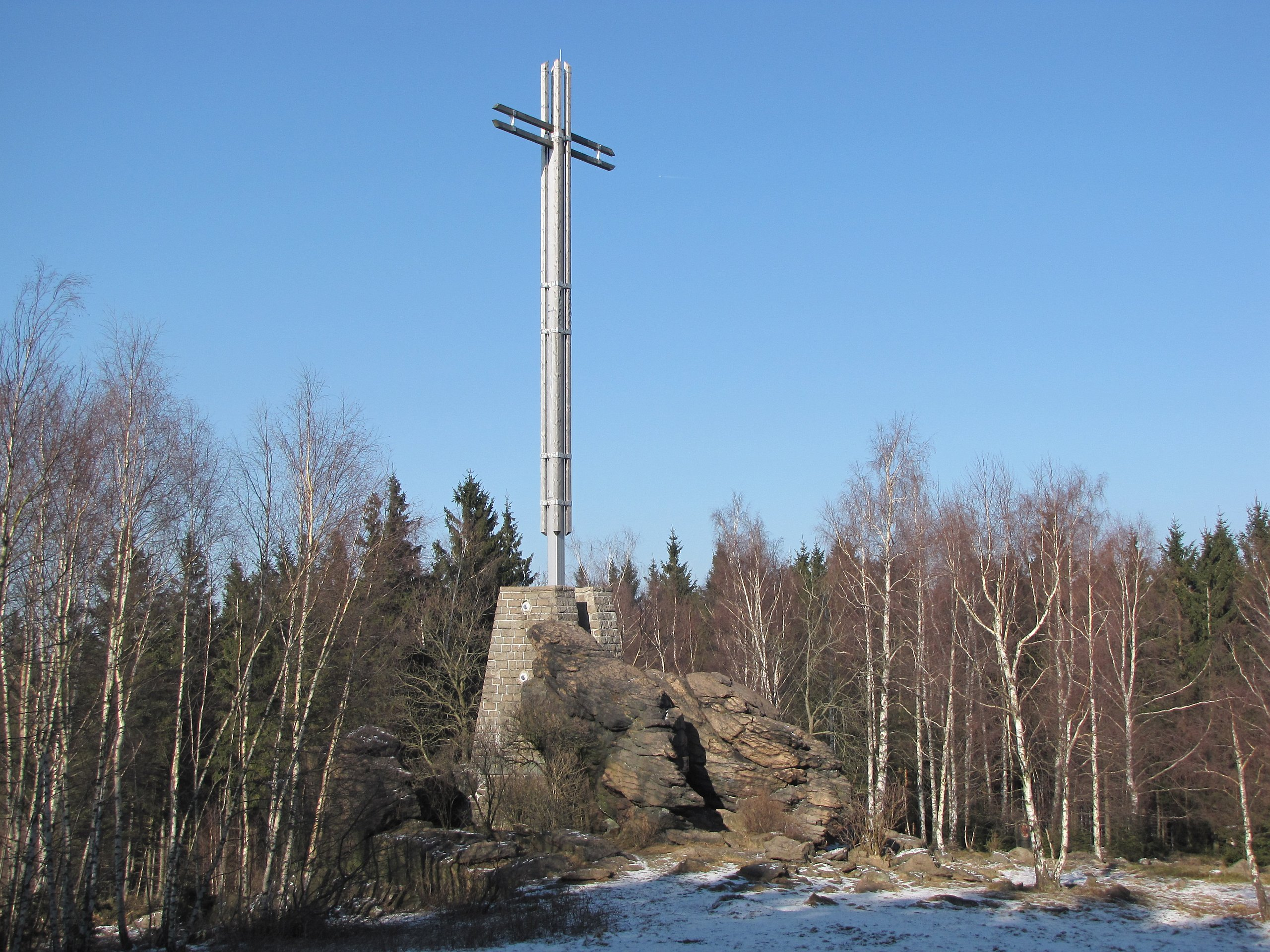 Das Kreuz des Deutschen Ostens auf den Uhlenklippen nordöstlich von Bad Harzburg